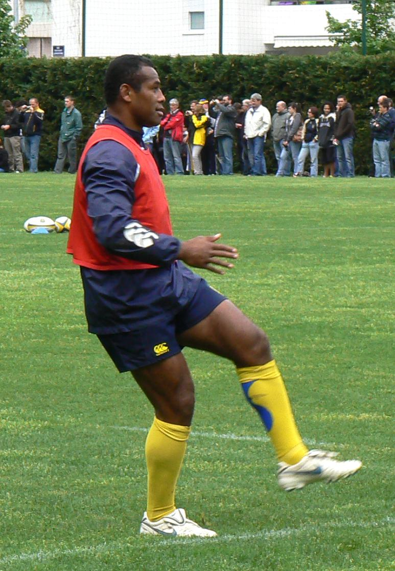 Le rugbyman fidjien Seremaia Baï s'entraine avec l'ASM Clermont Auvergne.